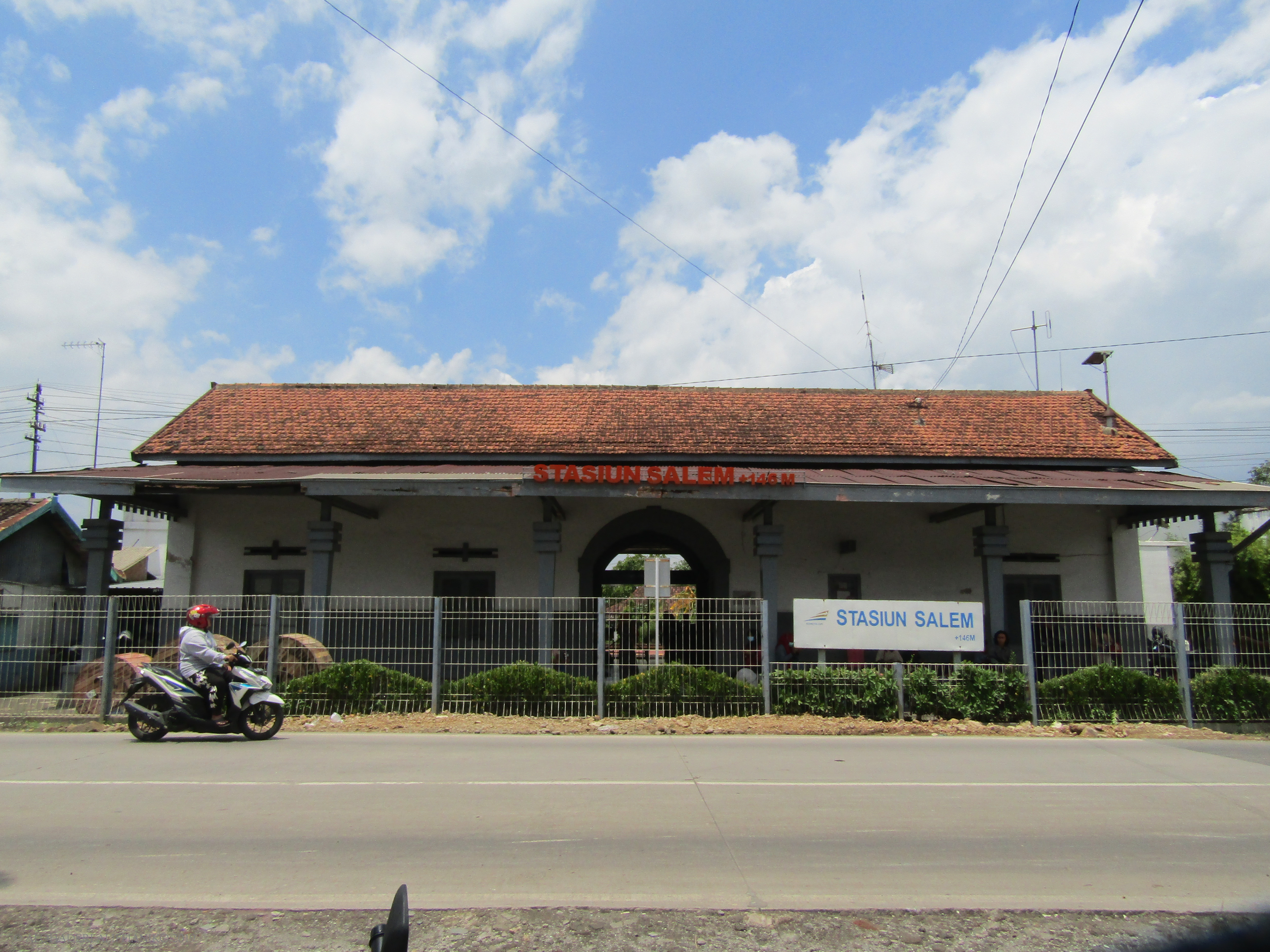 Tampak depan Stasiun Salem, 2019